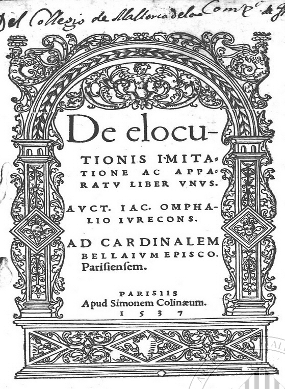 Jakob von Omphal (1500-1567) Jurist,kurkölnerischer Kanzler mit seiner 1537 erschienen Schrift "De eluctionis imitatione"